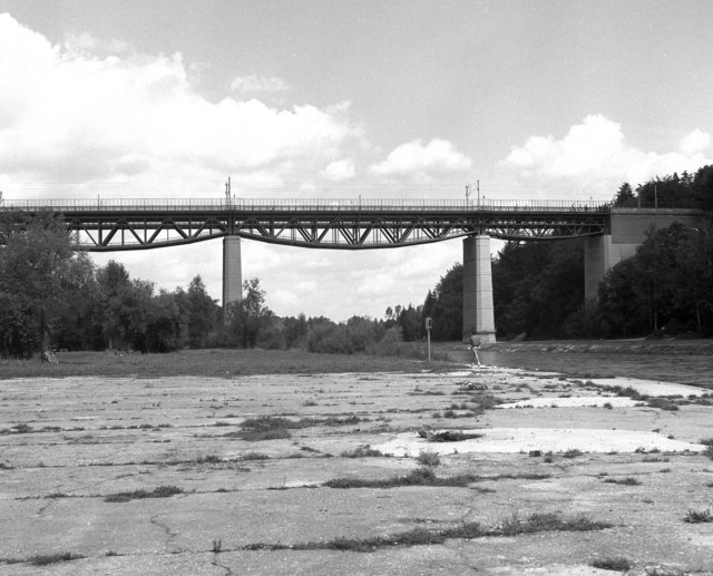 Grosshesselohebrucke